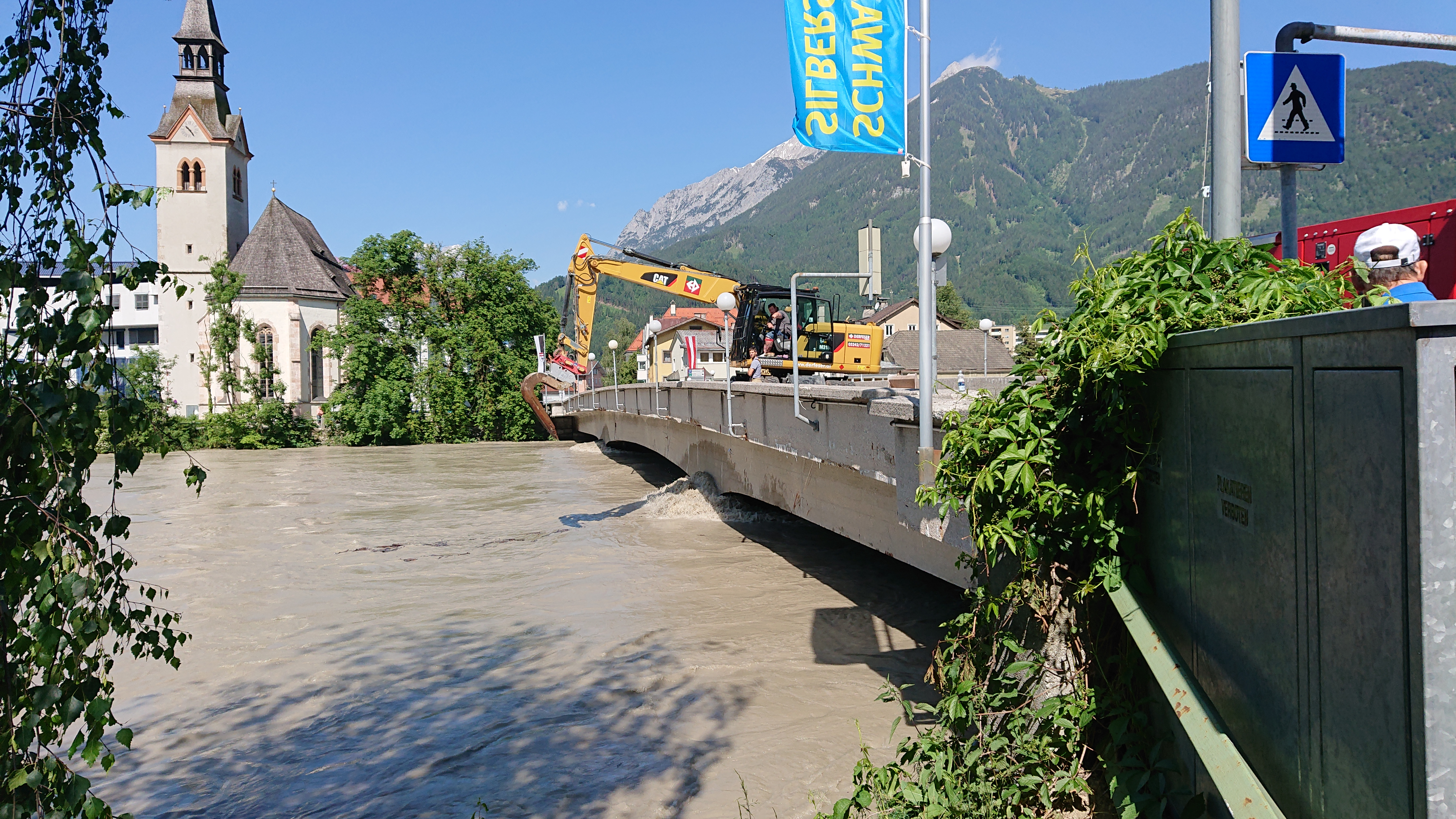 Im Juni 2019 verursachte Schmelzwasser einen kritischen Anstieg des Innpegels, weshalb die Steinbrücke für den öffentlichen Verkehr gesperrt wurde. Durch Einsatz eines Baggers konnten Verklausungen im Bereich der Brückenpfeiler verhindert werden.